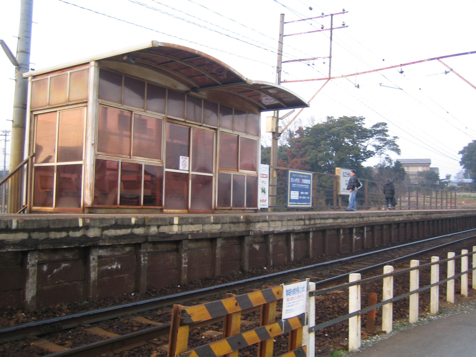 Mukougaoka Station (向ヶ丘駅), in Aichi, Japan